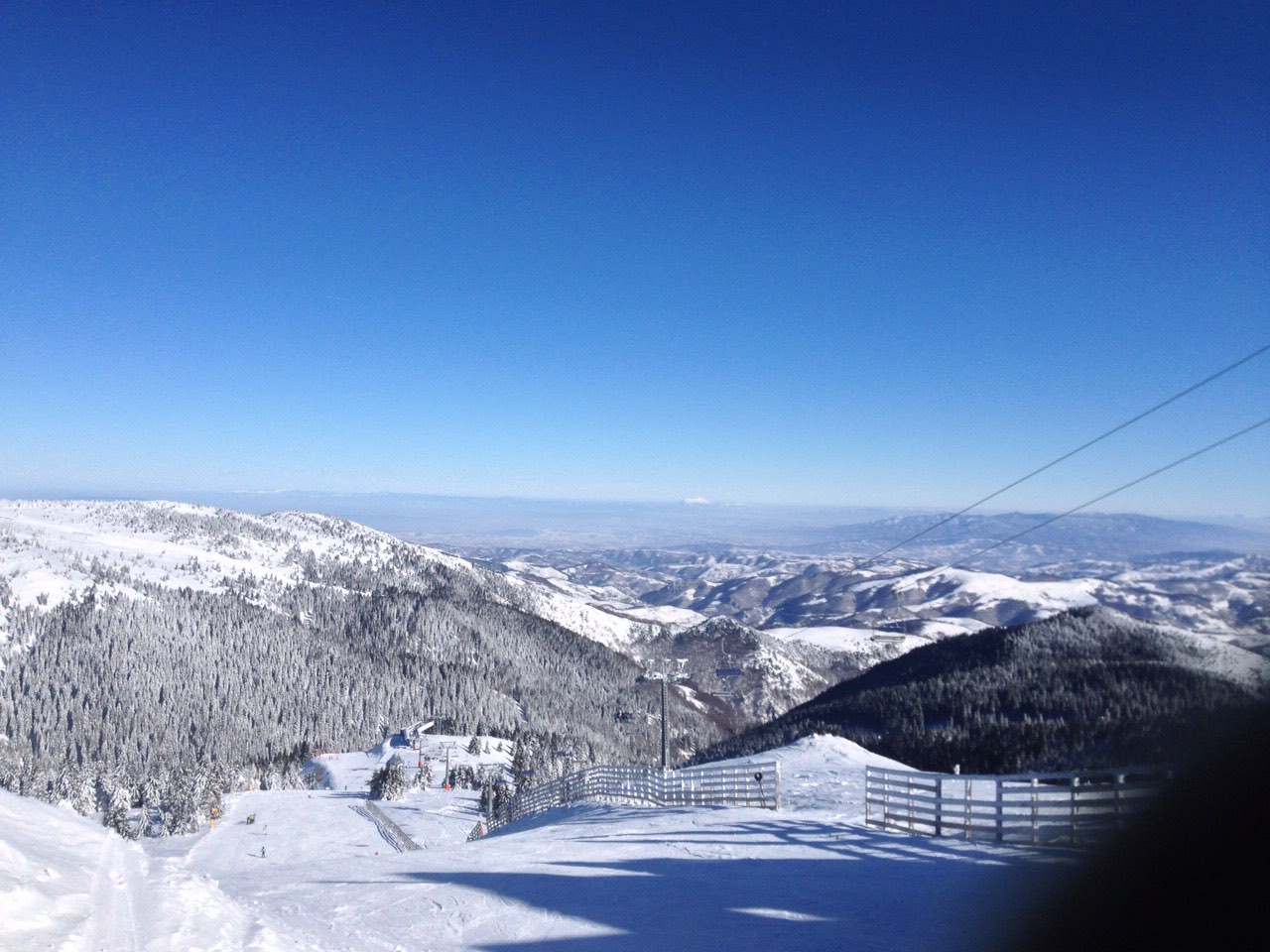 Srpski (latinica): Ово је фотографија заштићеног природног добра у Србији под шифром: НП02This is a a photo of a natural area in Serbia with ID: НП02 Kopaonik okupan suncem usred zime.